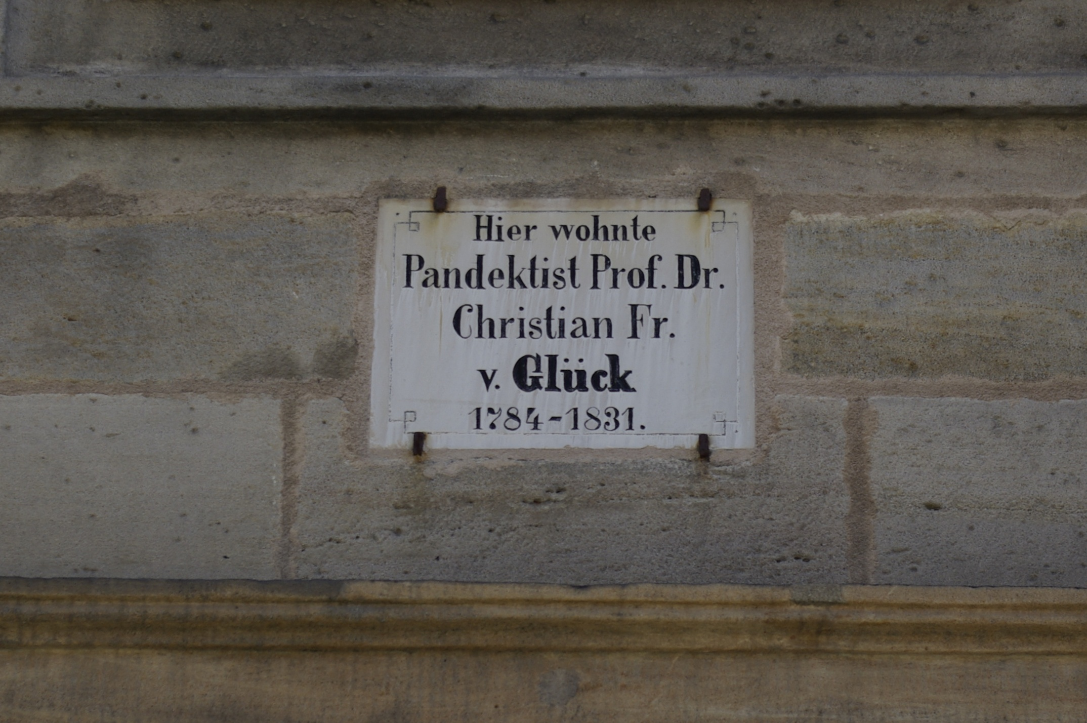 Gedenktafel für Christian Friedrich von Glück am Lynckerschen Palais in der Friedrichstraße 35 in Erlangen.